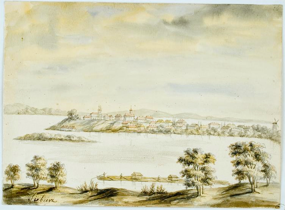 Беларуская (тарашкевіца): Себеж (Siebiež). Агульны выгляд з боку возера Себескага (Siebieskaje)